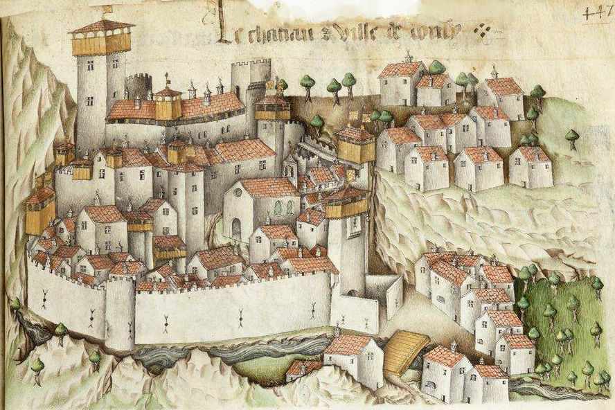 in armorial d'Auvergne description de villes chateaux et blaons.